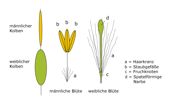 Blüten Typha